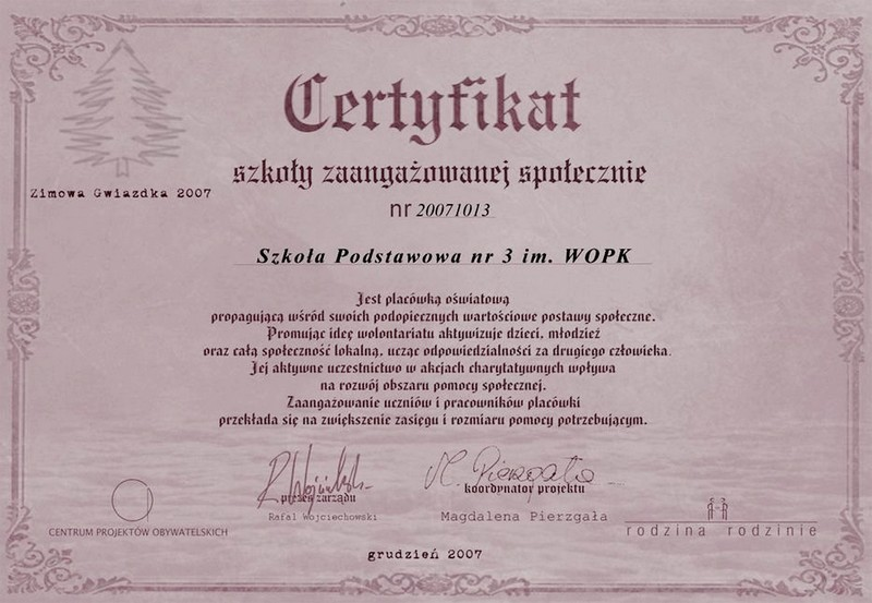 Certyfikat nr 20071013.